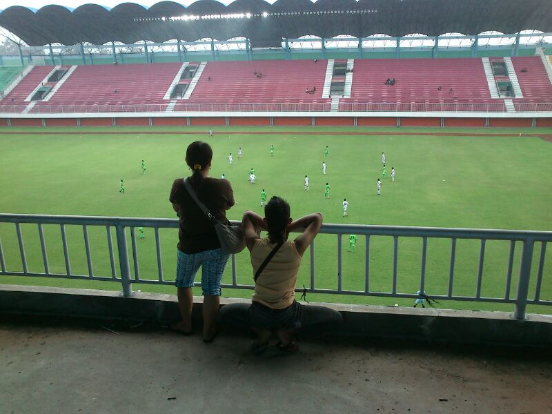 Suporter sedang melihat latihan klub PSS Sleman di Stadion Maguwoharjo